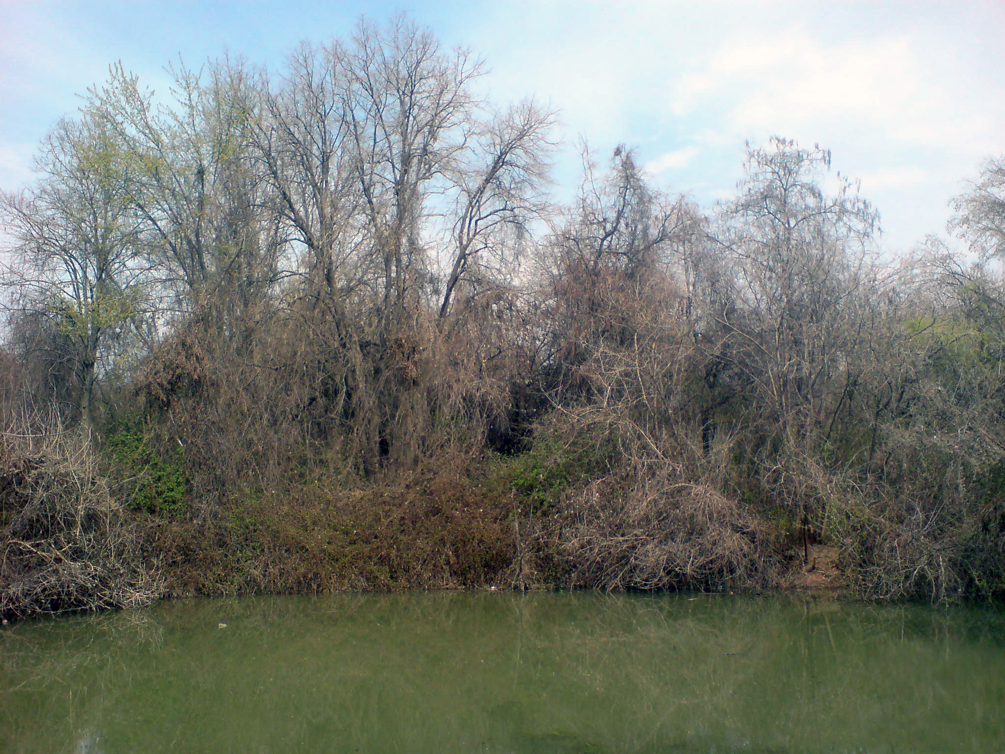 канал Аккурган в Ботаническом саду (Ташкент)